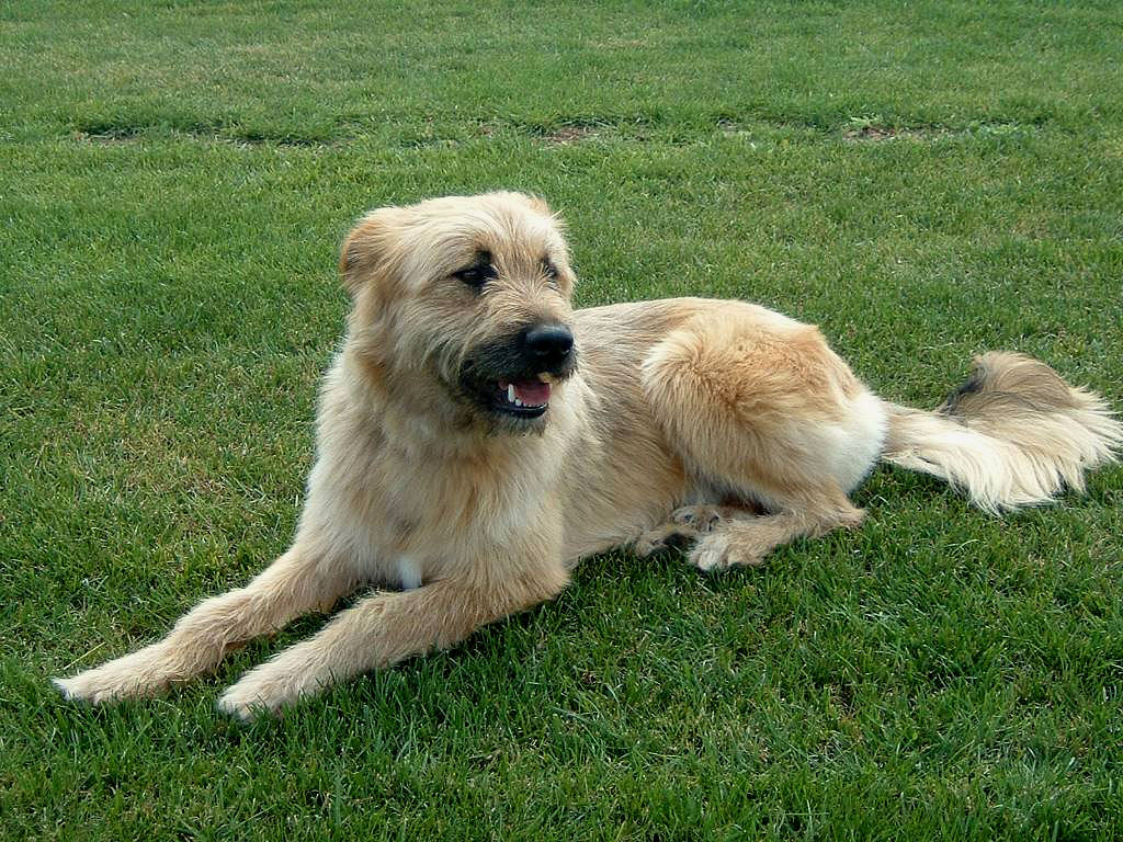 Euskal artzain txakur iletsua.